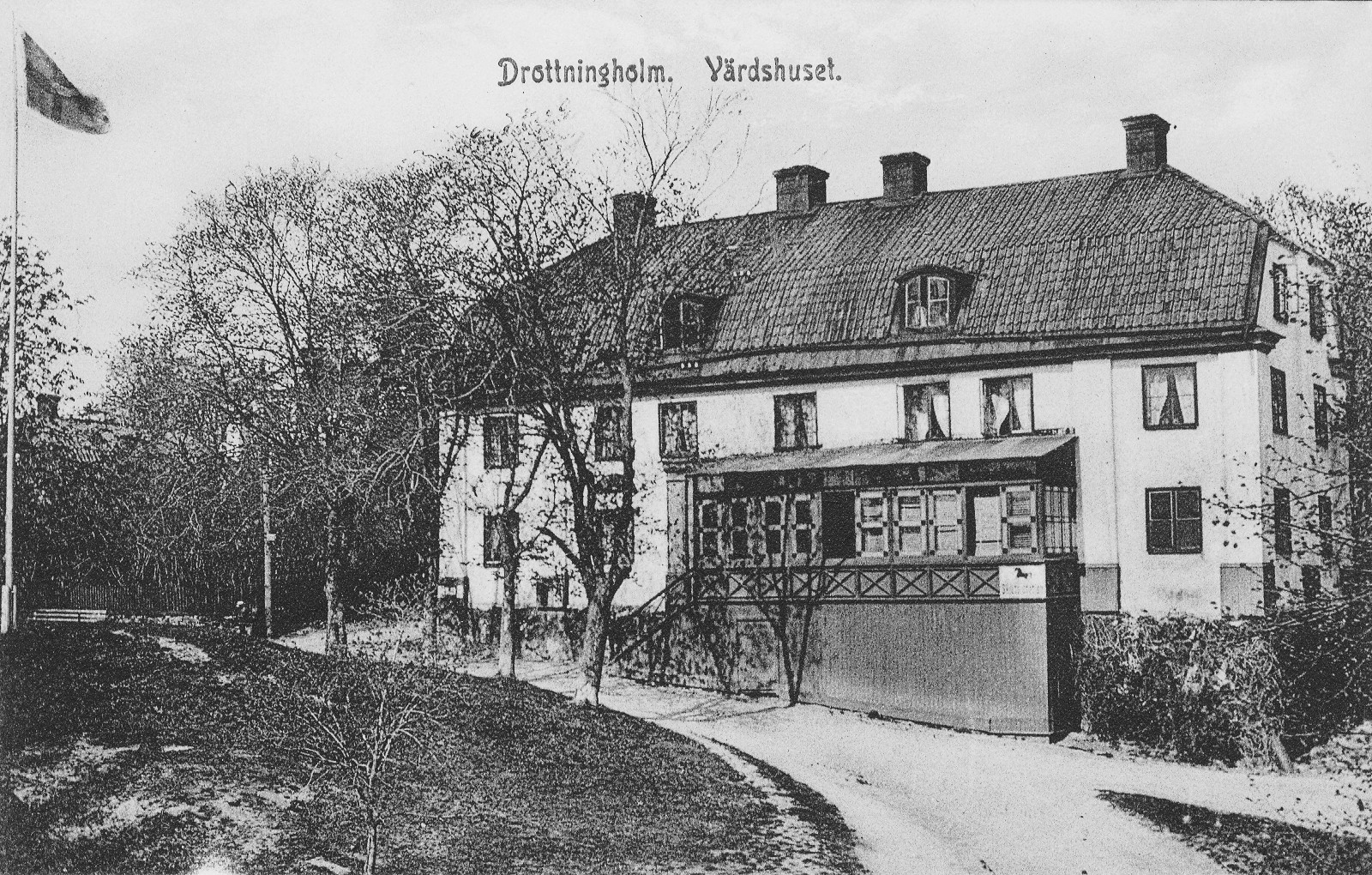 Drottningholms Gamla Värdshuset (Trävärdshuset) på Drottningholmsmalmen, brann ner 1912